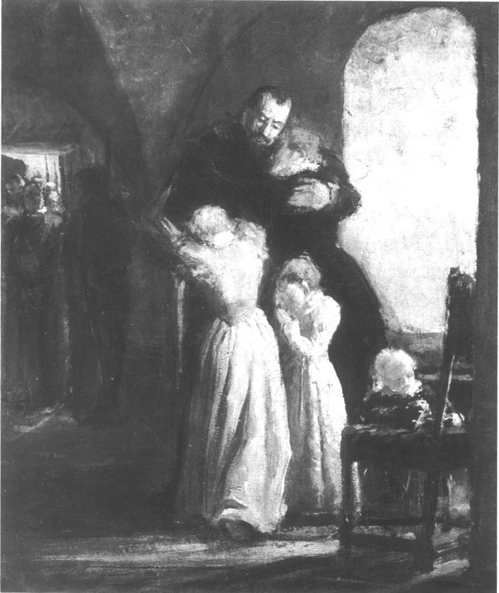 Familjen tar ett sista farväl av Gustaf Axelsson Banér när han ska halshuggas på Linköpings torg år 1600. Händelsen återgiven på en målning av Fanny Brate.